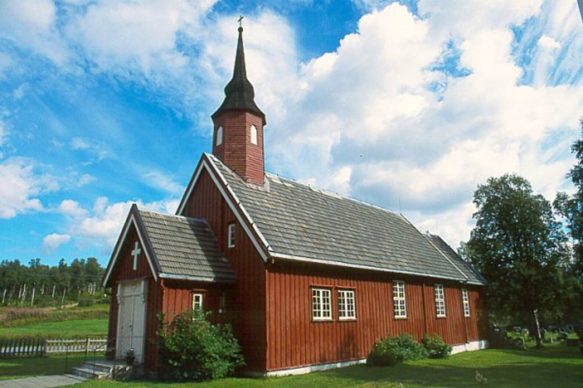 Stugudal kapell i Tydal kommune. Foto: O. & M. Reuber/Nasjonalt Pilegrimssenter/Digitalt fortalt. Fra Digitalt museum. Inventarnummer: DF.7096.